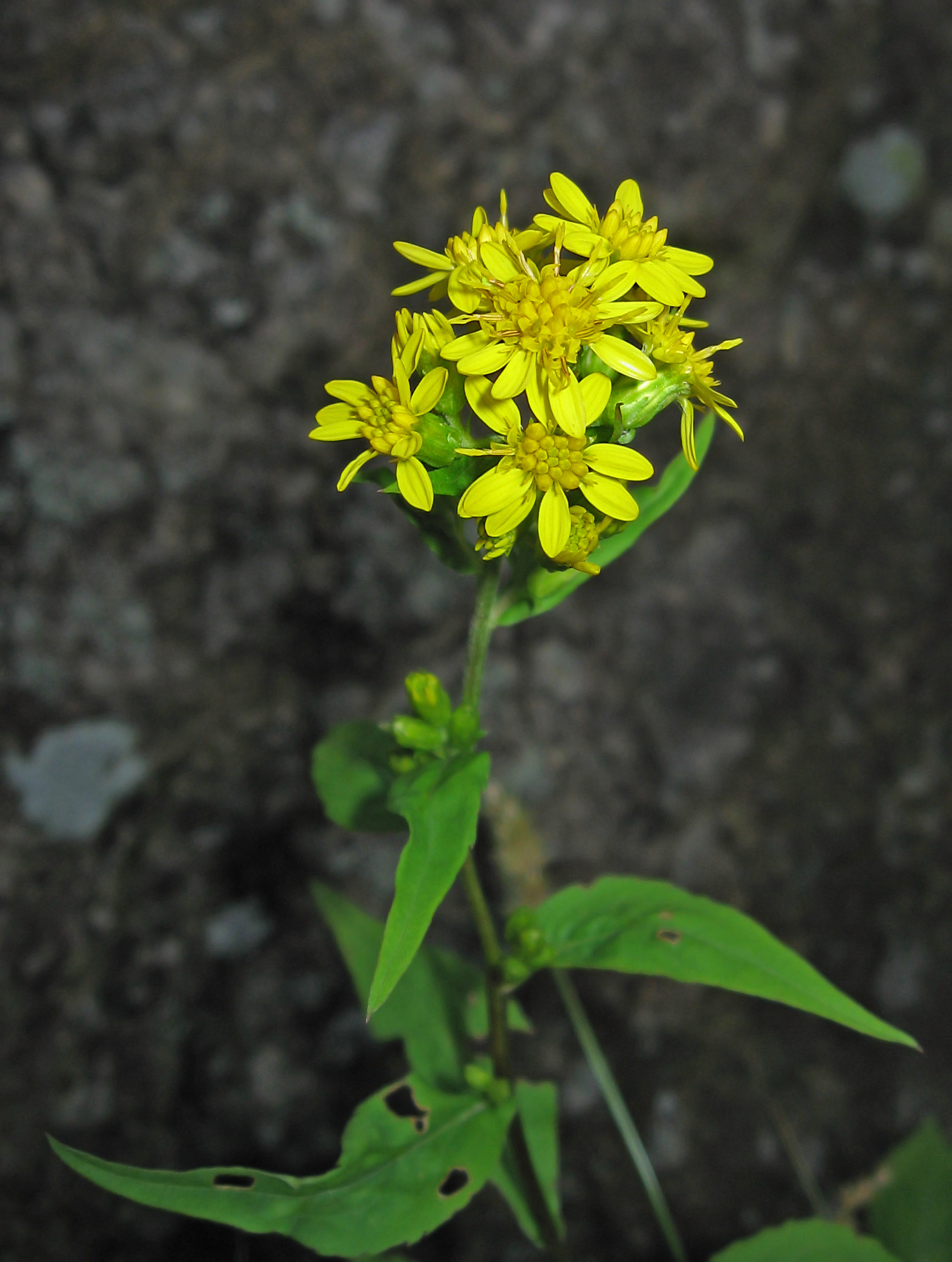 ミヤマアキノキリンソウ (学名：Solidago virgaurea var. leiocarpa)